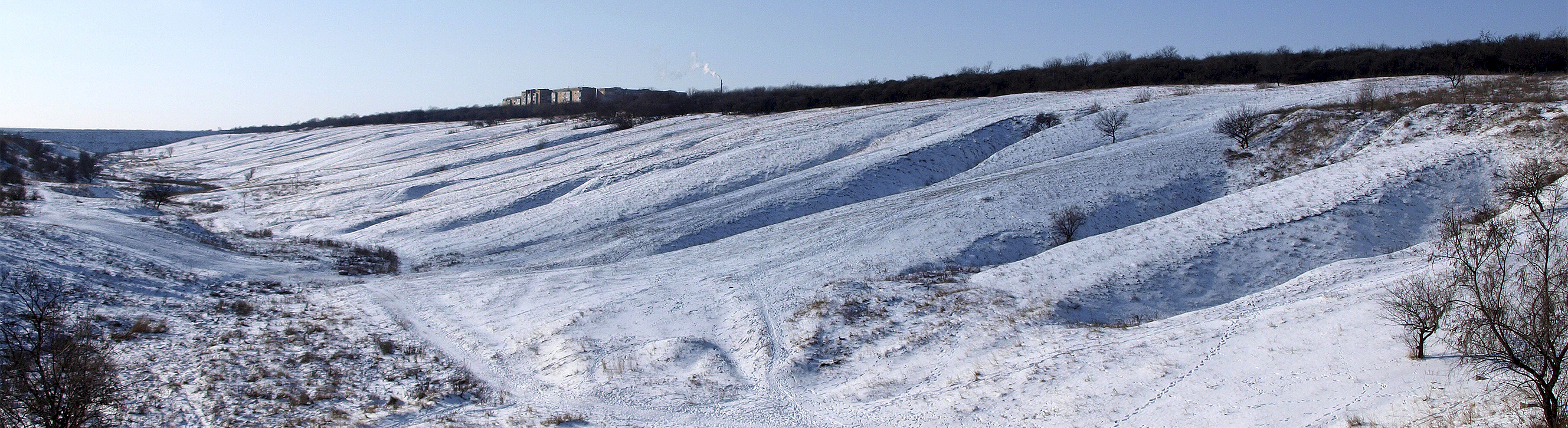 Калмицький яр. Яр узимку, Луганськ